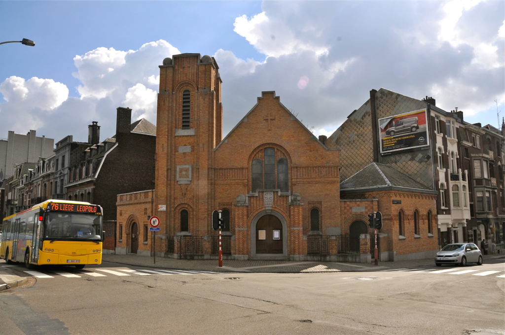 Protestante kerk aan de Quai Godefroid Kurth (Maasoever). De kerk dateert uit 1930 en is geheel in Art Deco stijl opgetrokken. De kerk is gebouwd ter nagedachtenis aan de in de 1ste wereldoorlog in België gesneuvelde Amerikaanse soldaten.